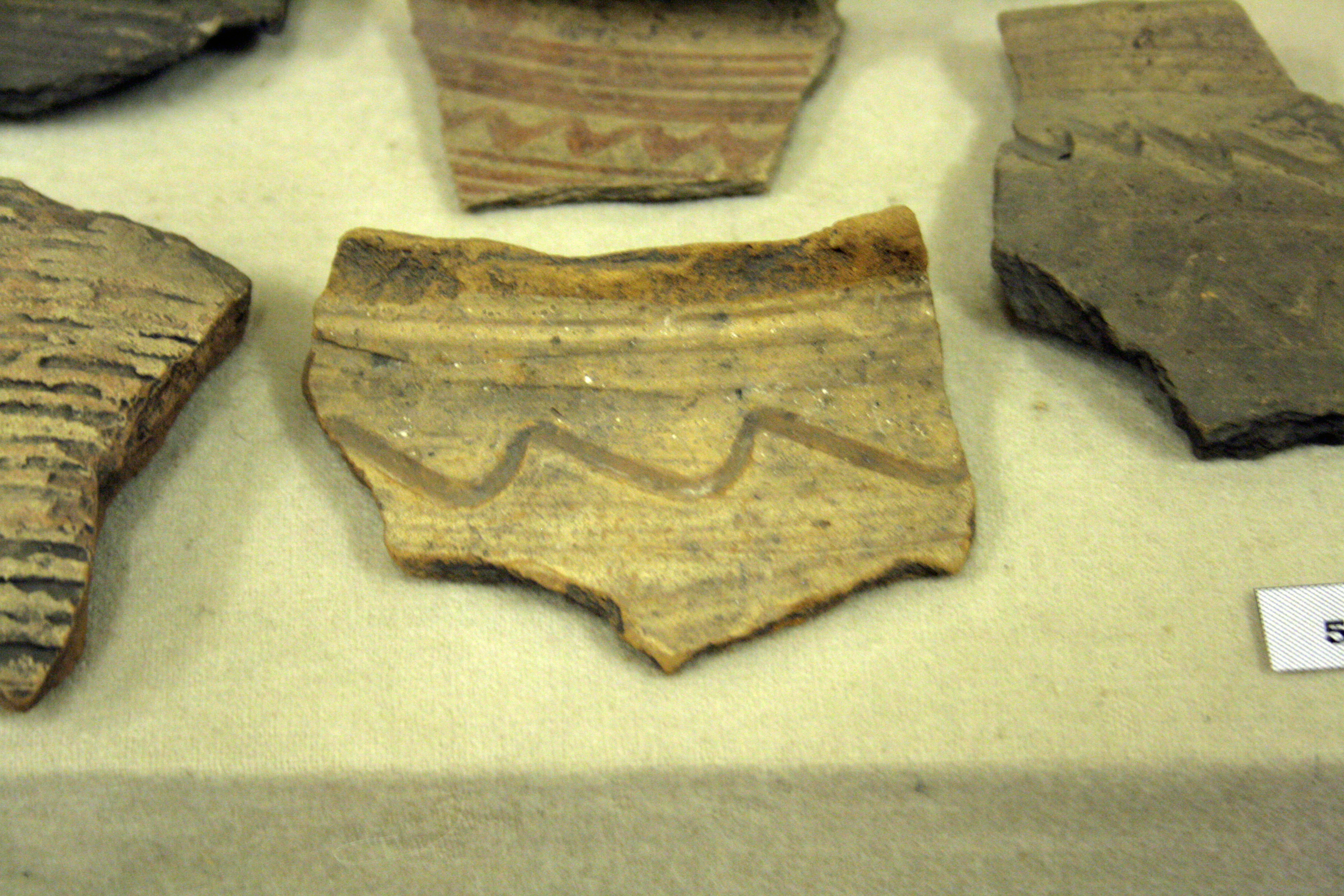 Керамика Крапивенского городища. Древнерусская культура, X–XIII века. Из фондов Шебекинского историко-художественном музея.